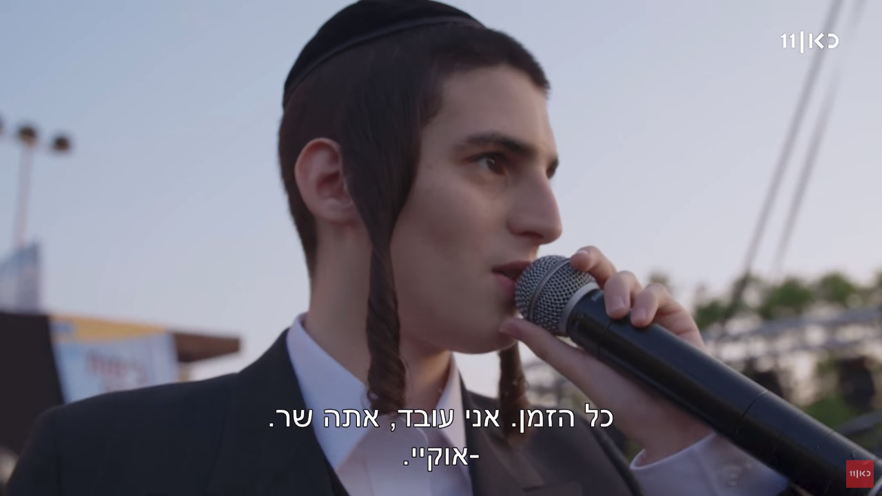 מוטי שטיינמץ, צילום מסך מהסדרה "חסידיסטוק" על המוזיקה החסידית החדשה